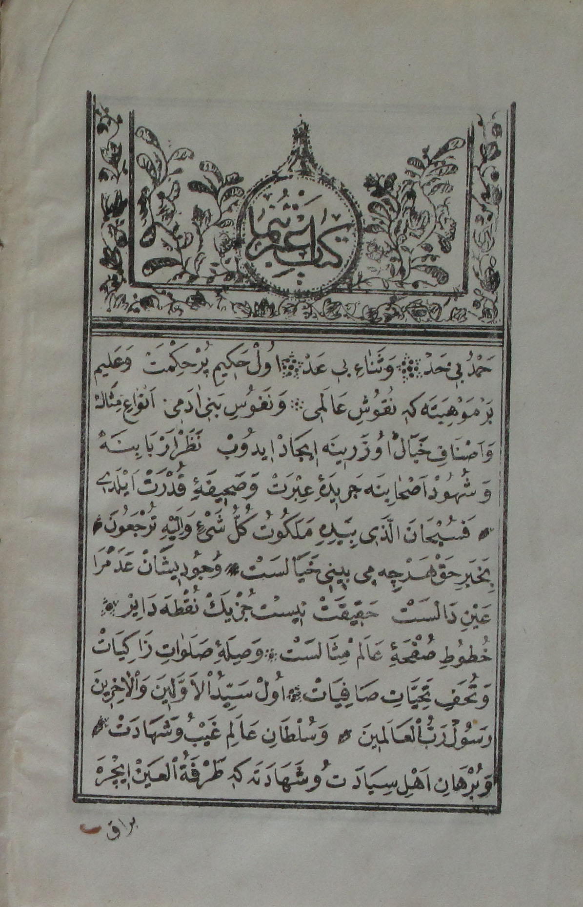 Kitab-ı ibretnüma [كتاب عبرتنما] / Lâmiî Çelebi, Mahmud b. Osman [لامعى چلبى، محمود بن عثمان] ; ktb.: İbrahim Nureddin Kütüphane: İ.B.B. Atatürk Kitaplığı Sayısal Arşiv ve e-Kaynaklar Koleksiyon: Belediye Osmanlıca Kitaplar Koleksiyon